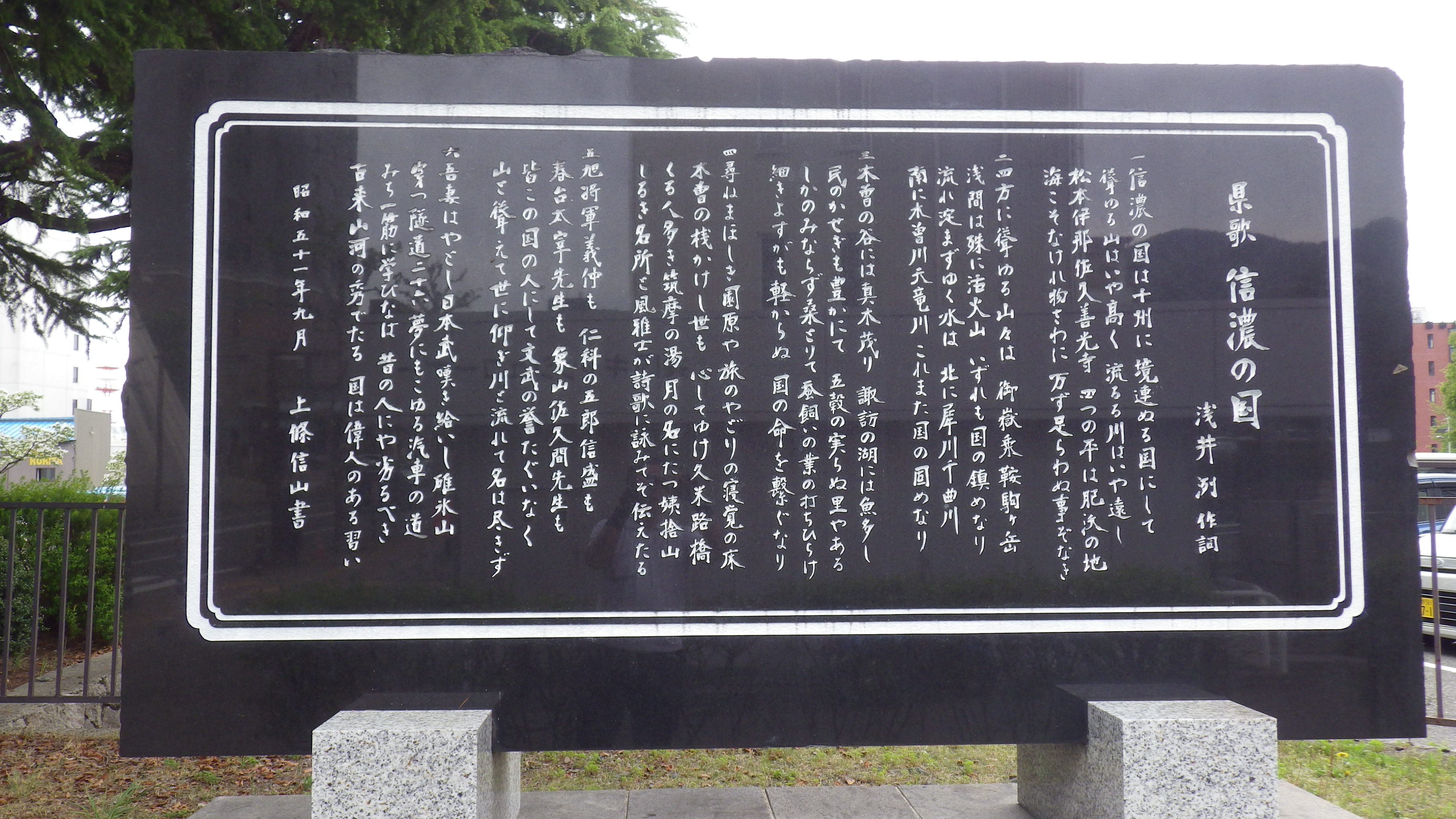 長野県庁前にある「信濃の国」の 歌碑の表面です。